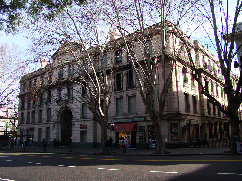 Casa Colectiva Valentín Alsina, Buenos Aires, Argentina. La Comisión Nacional de Casas Baratas construyó en 1919 la primera casa colectiva para obreros, denominada Valentín Alsina todavía en pie, en el barrio de Parque Patricios en la intersección de las calles 24 de Noviembre y Caseros, frente al Parque de los Patricios.